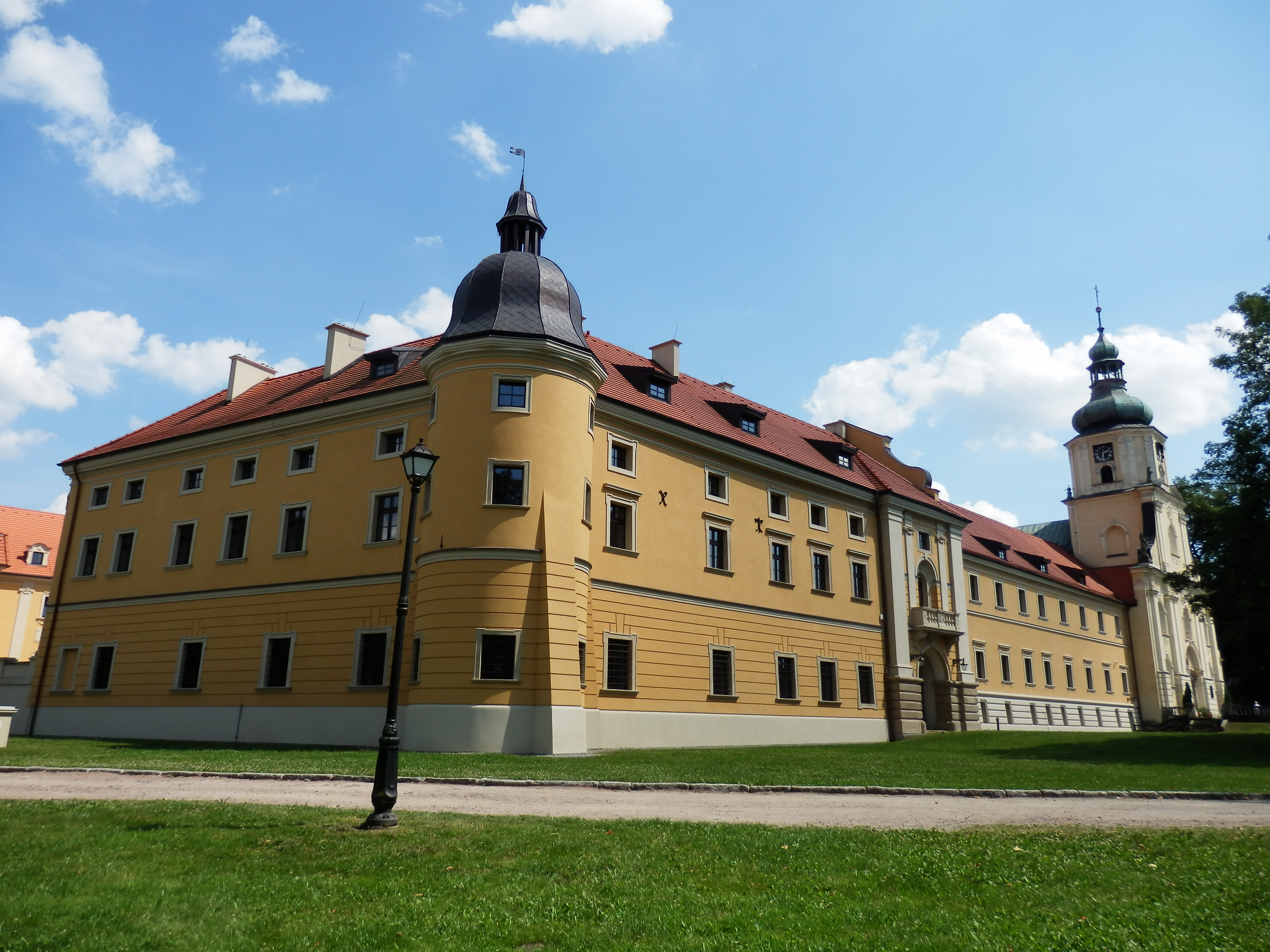 Rudy, zespół klasztorny cystersów